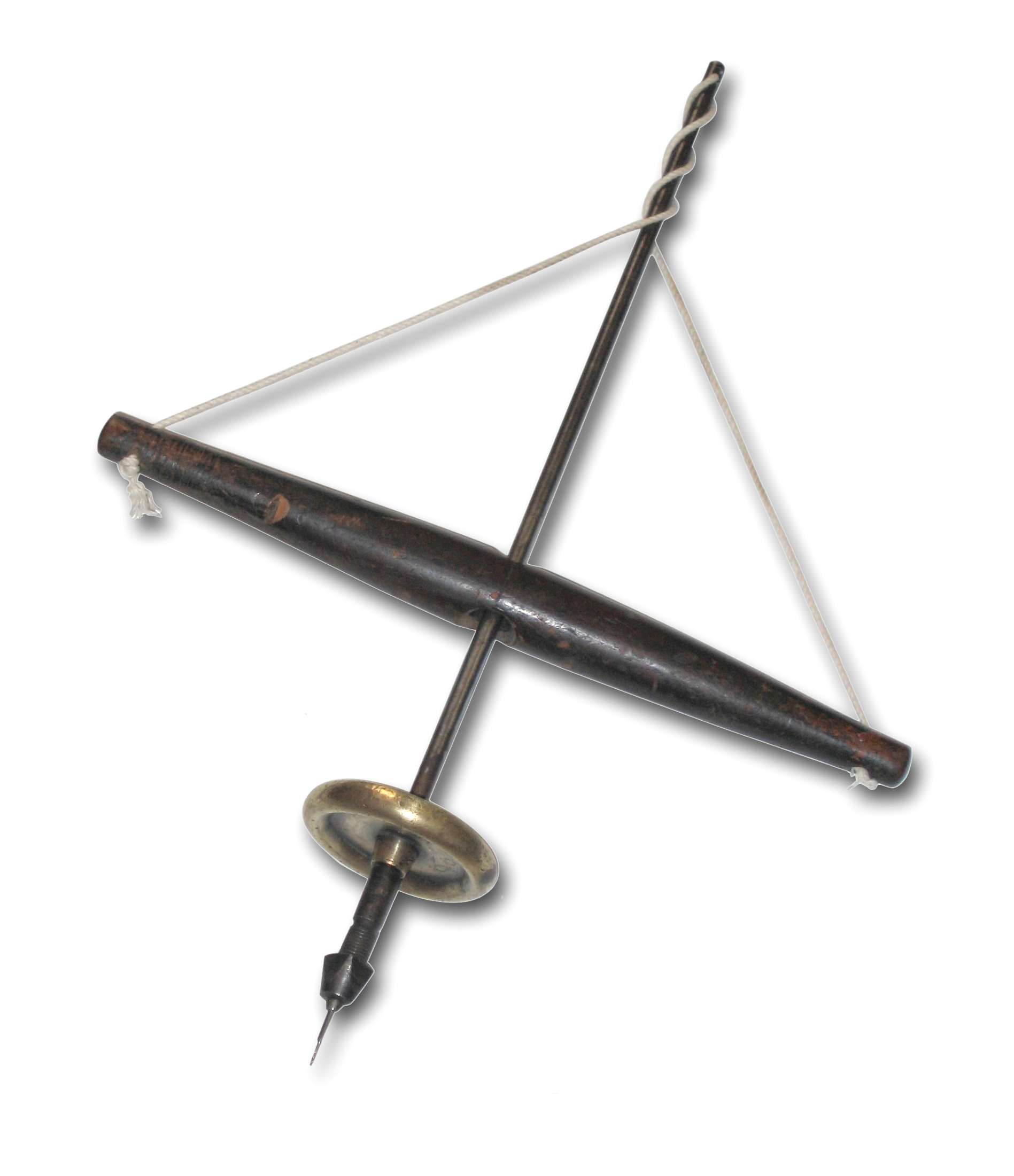 Drille actuellement utilisée à l'Or de Vaise photo Dominique grassigli